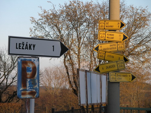 Rozcestník v obci Miřetice u Hlinska